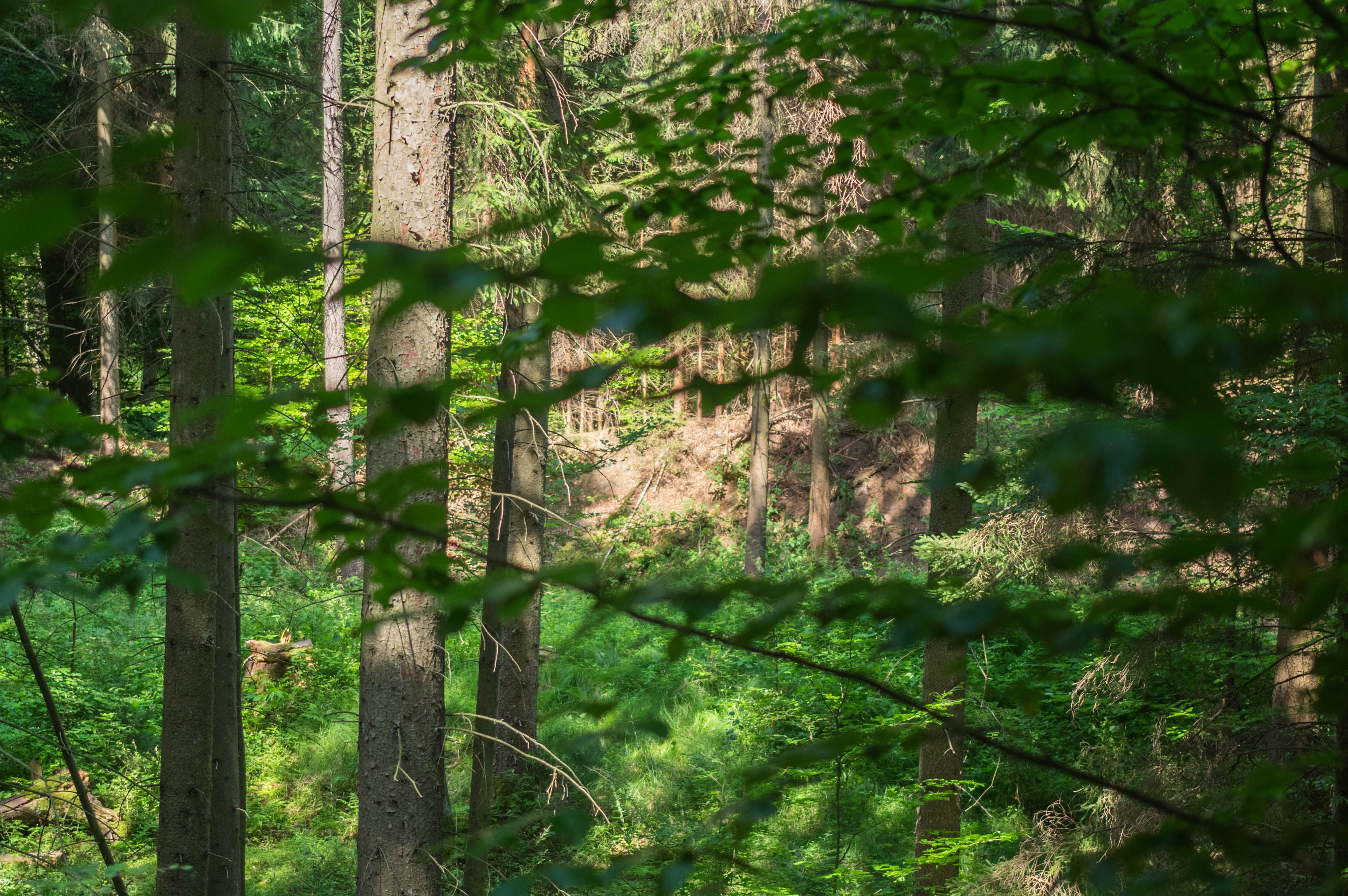 das Gebiet um die geologische Orgel im Esterholz ist während der Wuchsperiode nahezu unzugänglich, Geotop 779H004